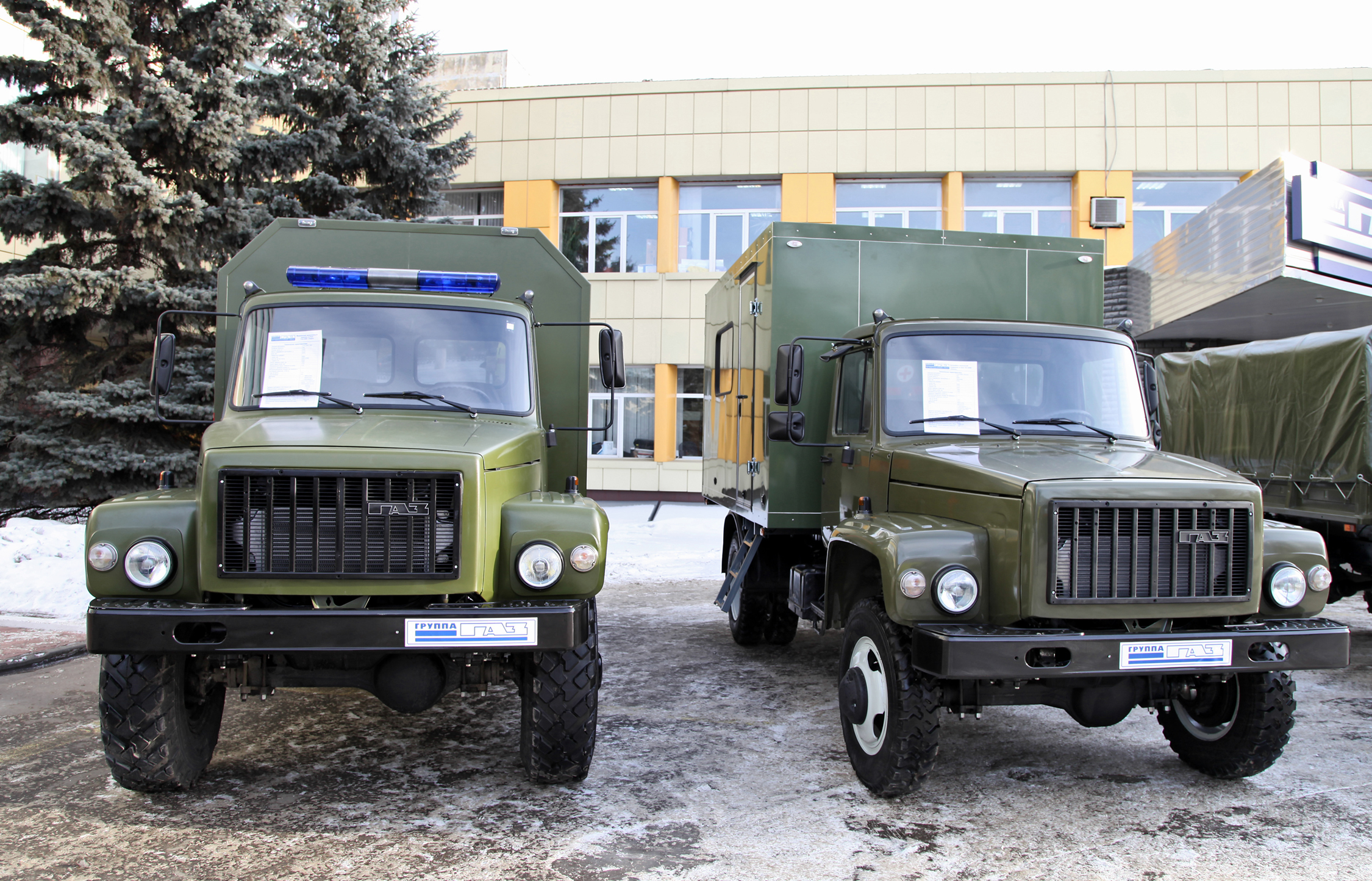 ГАЗ-33081-1091 и автомобиль технической поддержки ГАЗ-33086 Земляк (GAZ-33081-1091 and technical support vehicle GAZ-33086 Zemlyak)